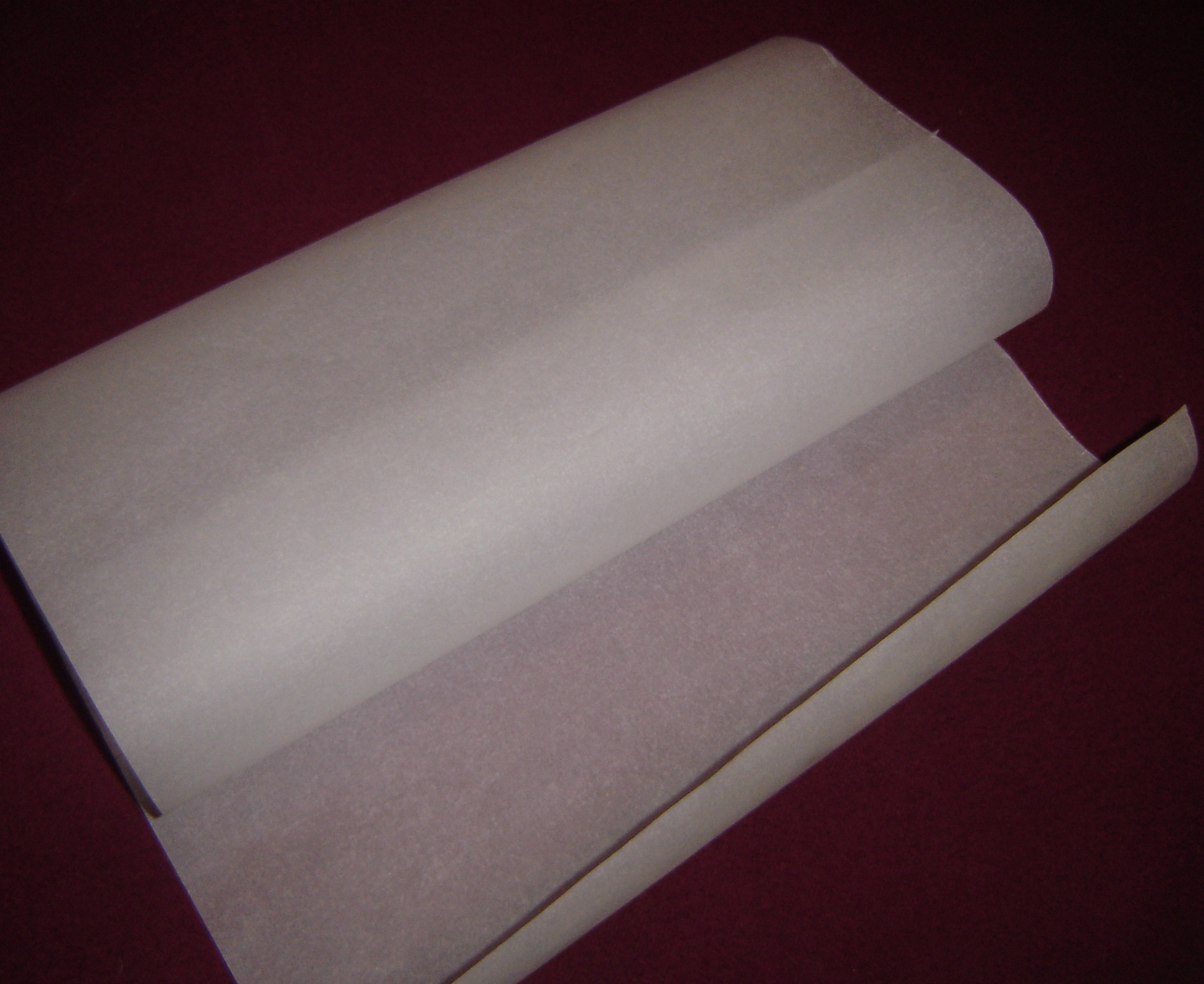 dosya bana aittir. hiç bir yerden alın mamıştır.